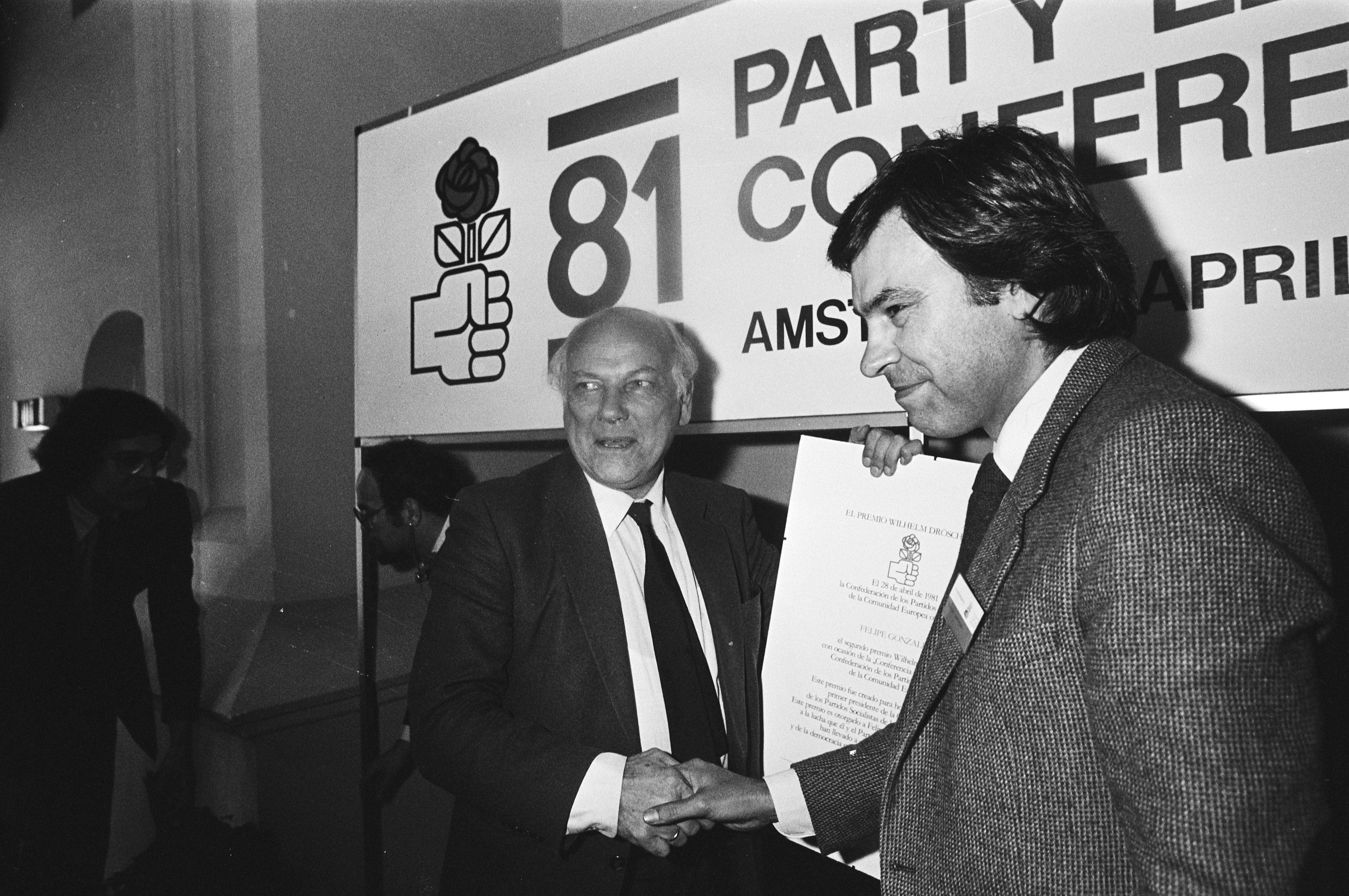 Collectie / Archief : Fotocollectie Anefo Reportage / Serie : [ onbekend ] Beschrijving : Party Leaders Conference bijeenkomst socialistische partijen uit meeste landen om te vergaderen Spaanse Felipe Gonzalez Datum : 28 april 1981 Locatie : Amsterdam, Noord-Holland Trefwoorden : bijeenkomsten, politici, politieke partijen Persoonsnaam : Gonzalez, Felipe Fotograaf : Dijk, Hans van / Anefo Auteursrechthebbende : Nationaal Archief Materiaalsoort : Negatief (zwart/wit) Nummer archiefinventaris : bekijk toegang 2.24.01.05 Bestanddeelnummer : 931-4567